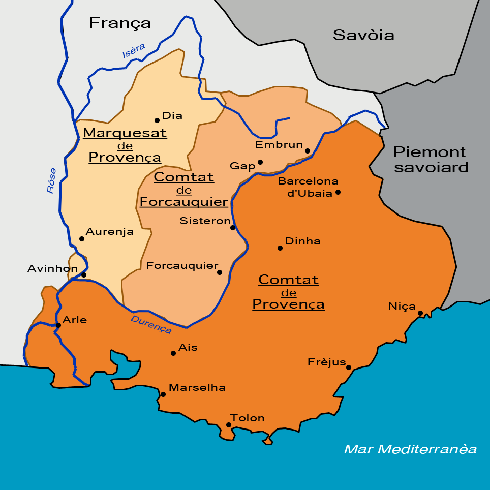 Carta de Provença en 1125